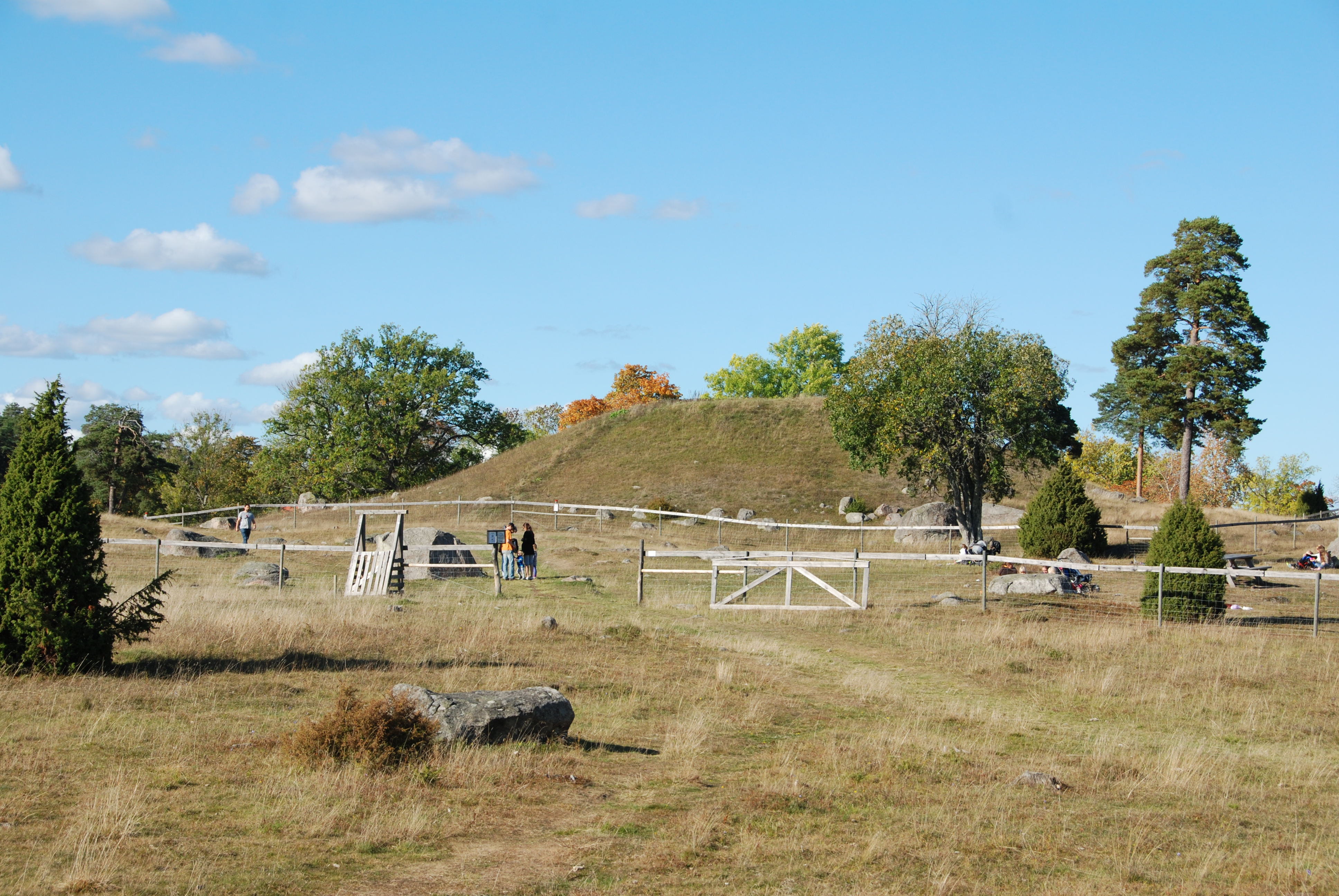 Hågahögen (Uppsala 356:1)